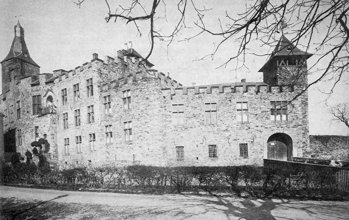 südwestliche Ansicht des Alten Schlosses Bensberg